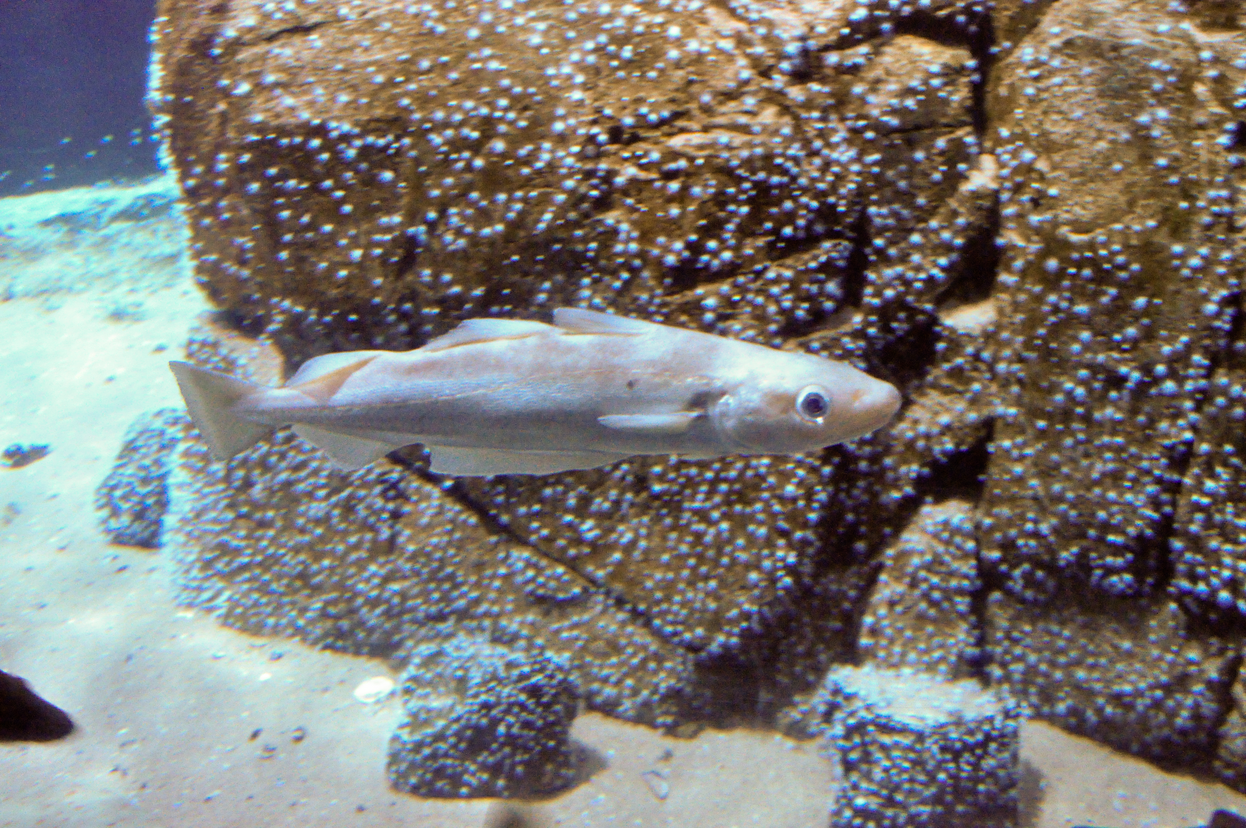 Petit merlan